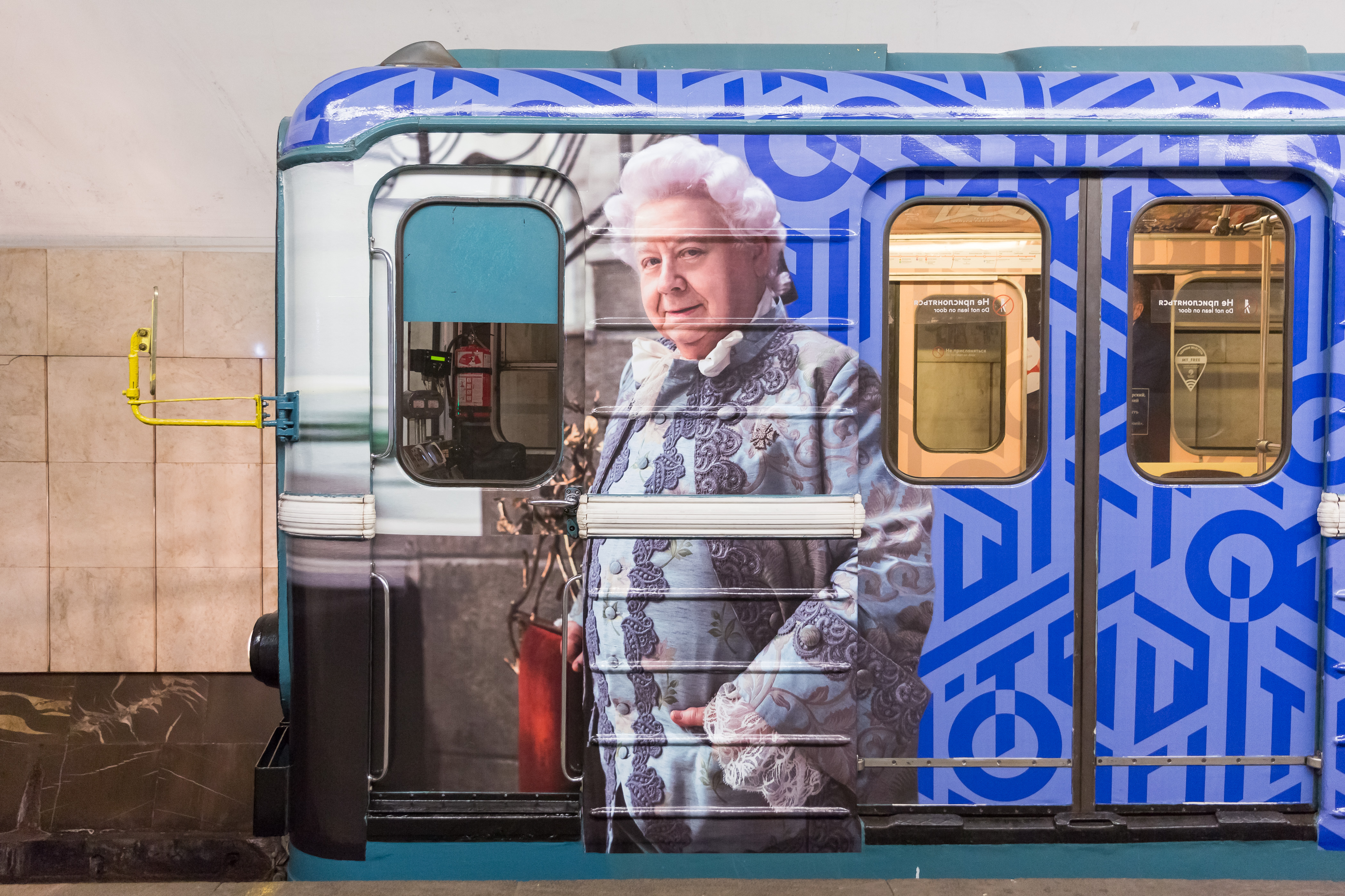 Изображение Олега Табакова на боковой стенке